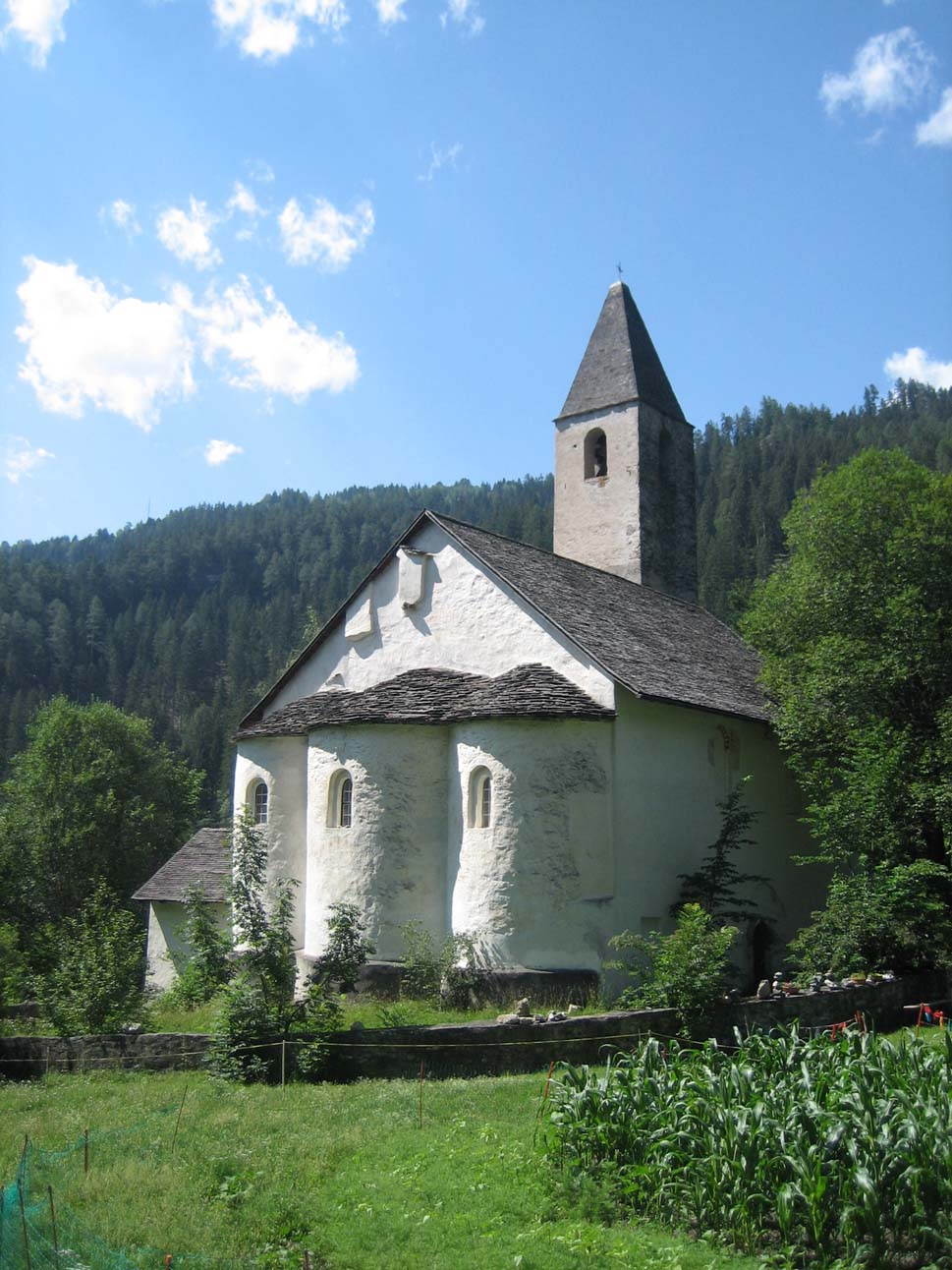 Aussenansicht